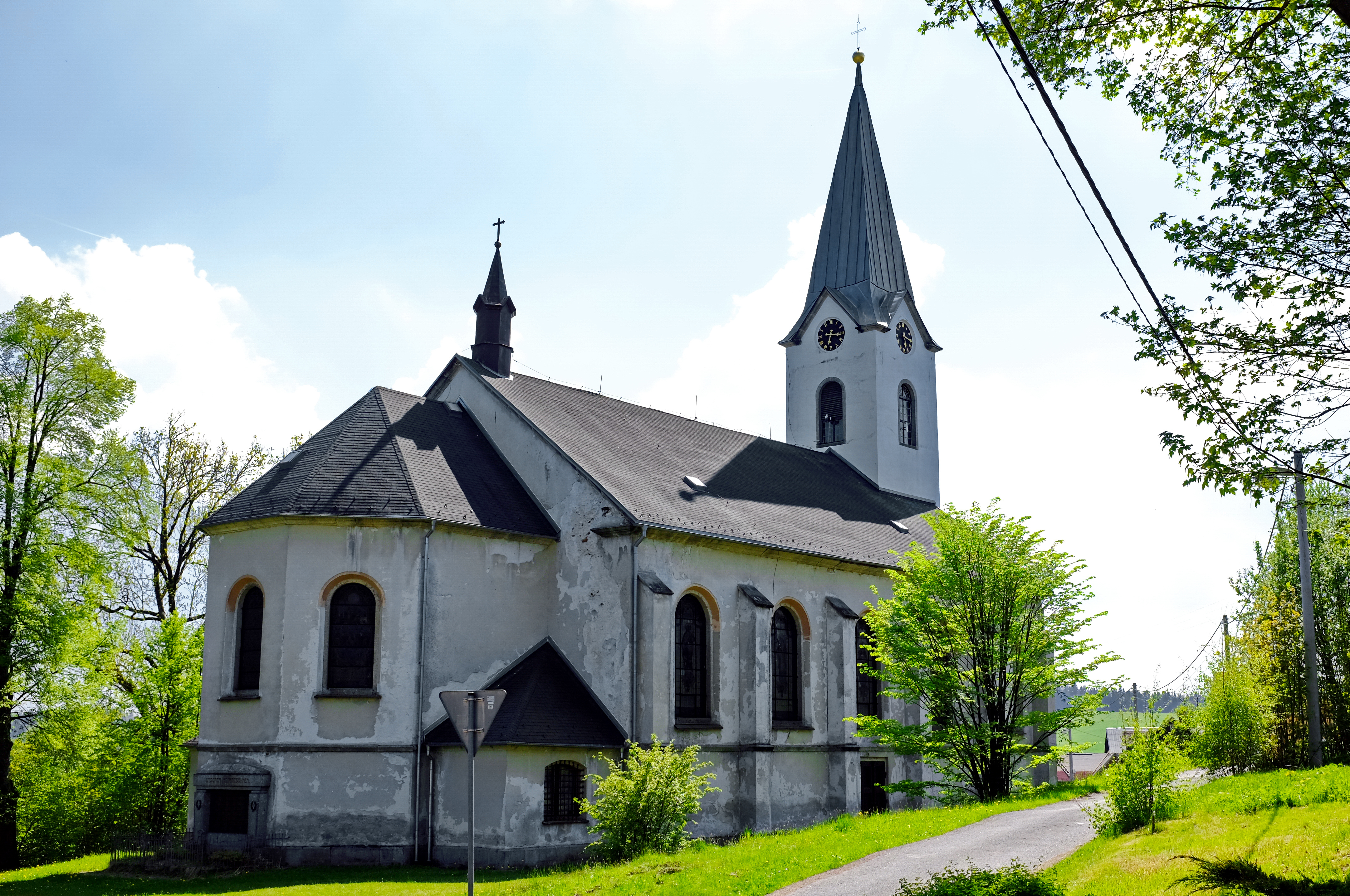 Bublava, kostel Nanebevzetí Panny Marie, Krušné hory, okres Sokolov